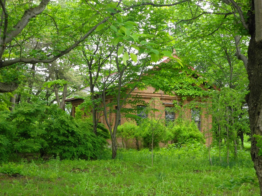 福島藤助が建てた変電所（弘前市富士見町）